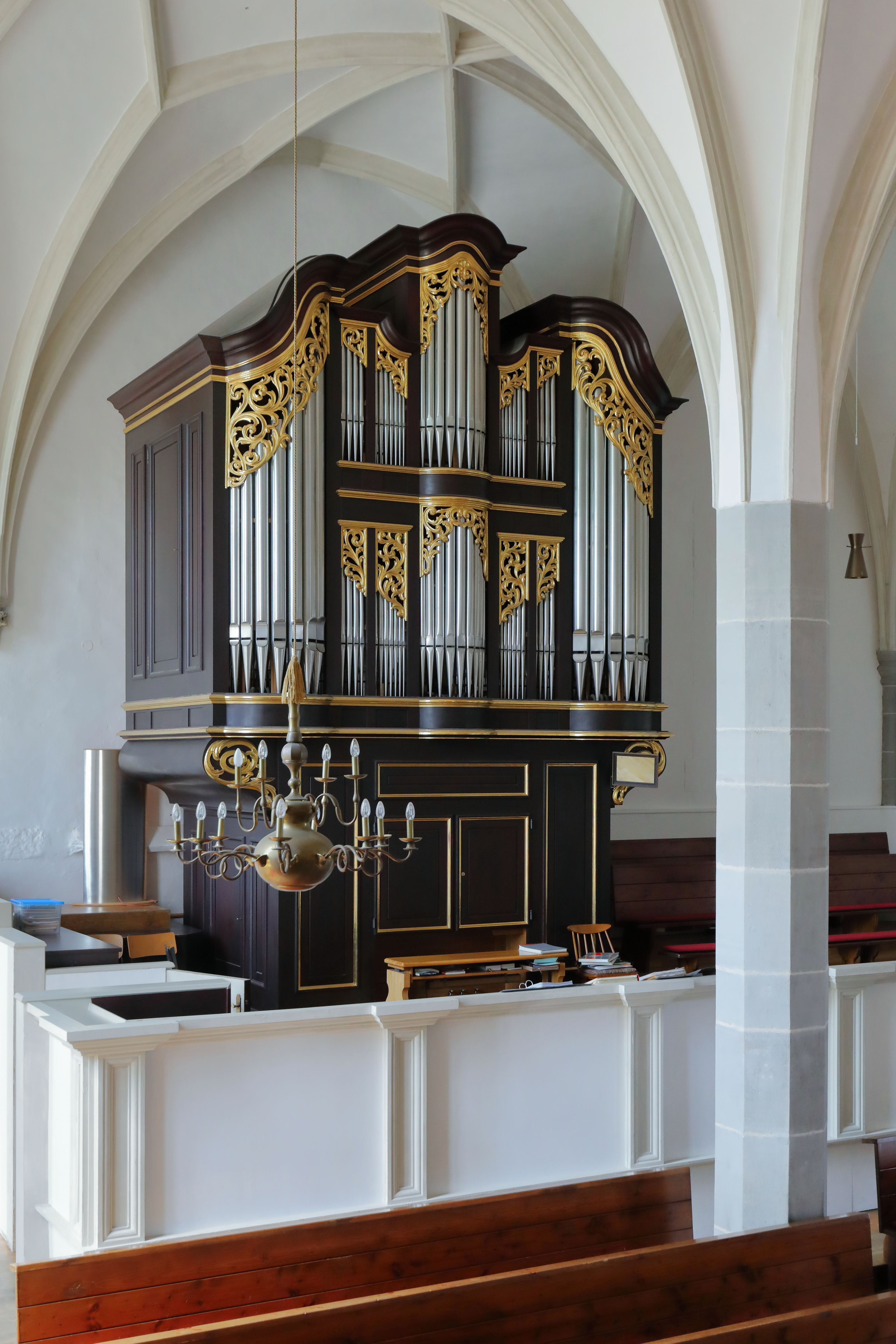 Orgel der röm.-kath. Pfarrkirche hl. Georg in der oberösterreichischen Marktgemeinde St. Georgen im Attergau.Die zweimanualige Orgel mit 21 Registern wurde von der Orgelbaufirma Reinisch-Pirchner OHG (Orgelbau Pirchner) gebaut und am 7. Juli 1991 geweiht. Die Fassung der Orgel liefert Firma Aichlseder, wobei die Schleierbretter (Holzschnitzereien am Prospekt der Orgel) Walter Meierhofer schnitzte.